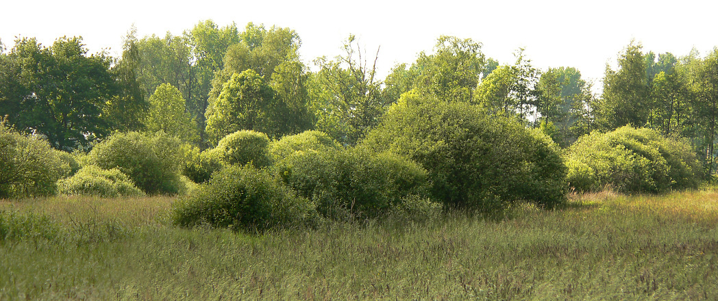 Typische Drömlingslandschaft